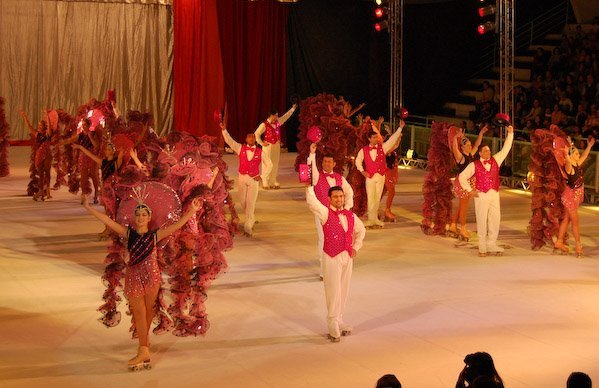 Periquitos em Revista. Shoe em São Pauoo, 2008